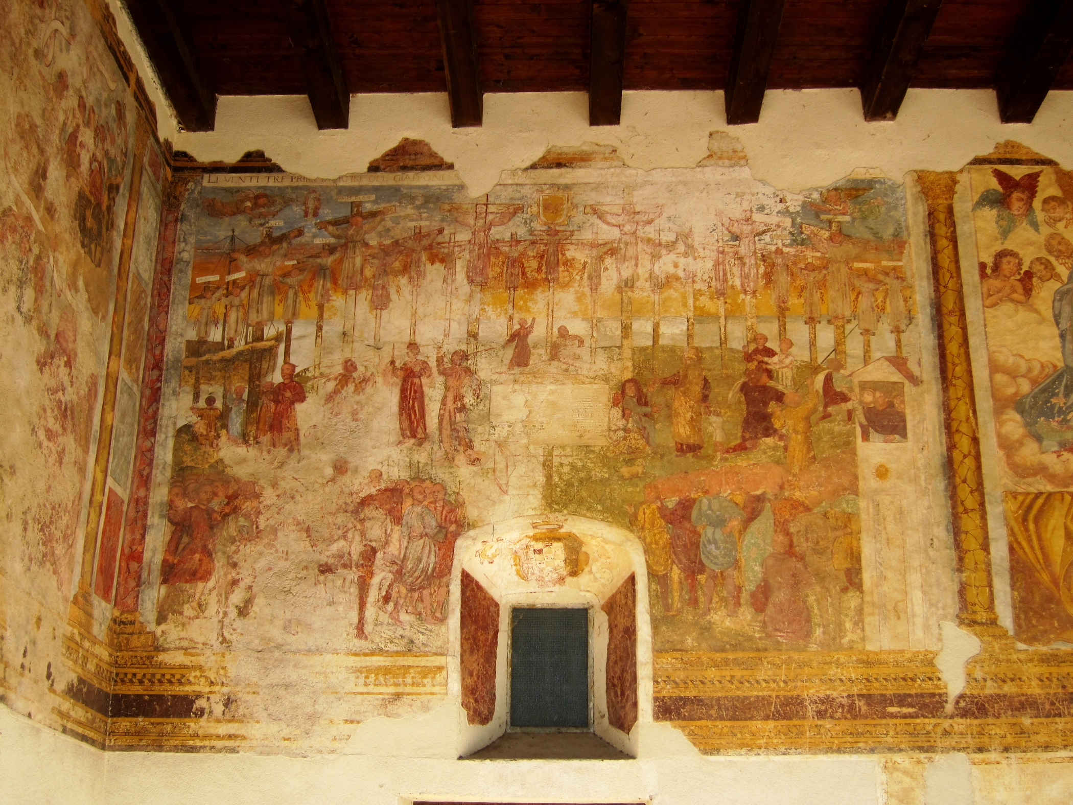 Fresque du porche de l'église du convento di Sant'Antonio à Rivello (Basilicate).